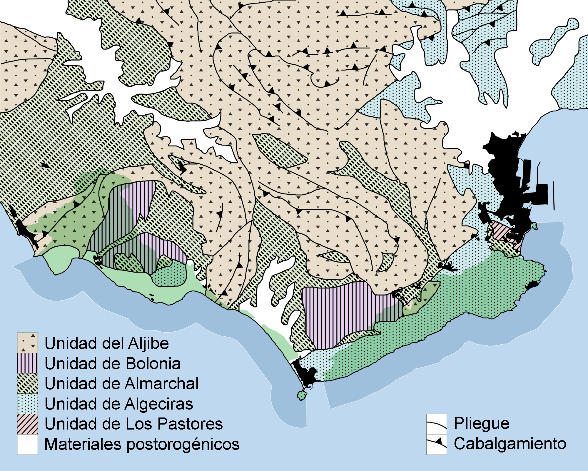 Mapa de unidades geológicas del Parque natural del Estrecho.